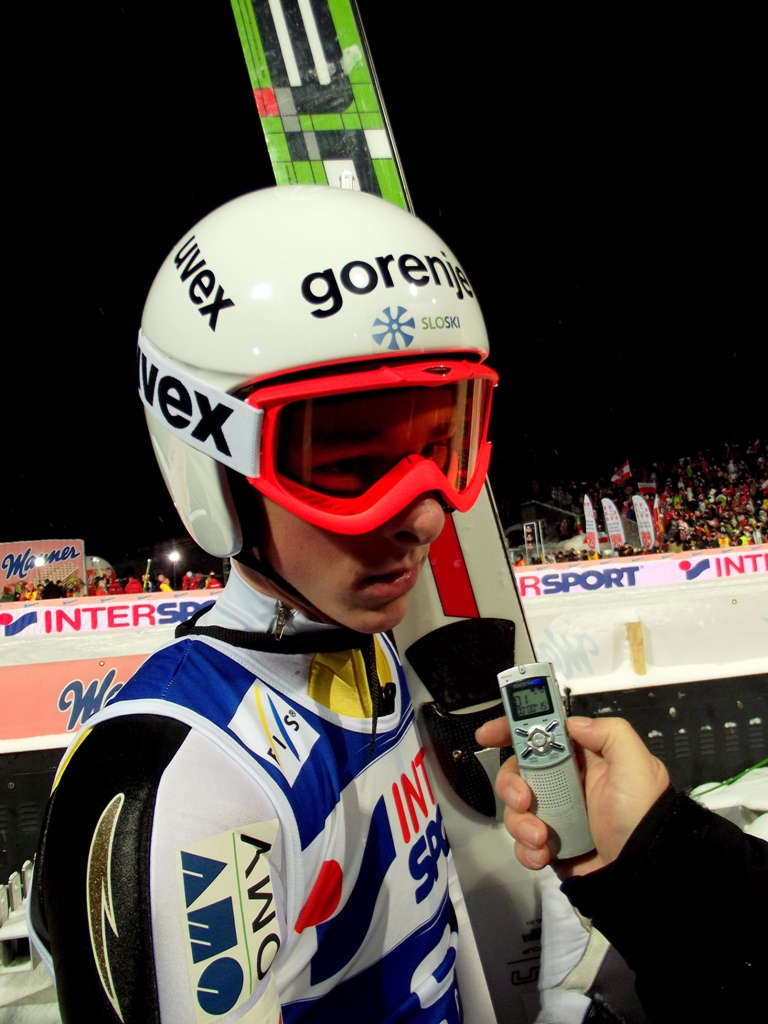 Zdjęcie zrobione podczas zawodów Pucharu Świata w Zakopanem w kokach narciarskich ze stycznia 2012 r.